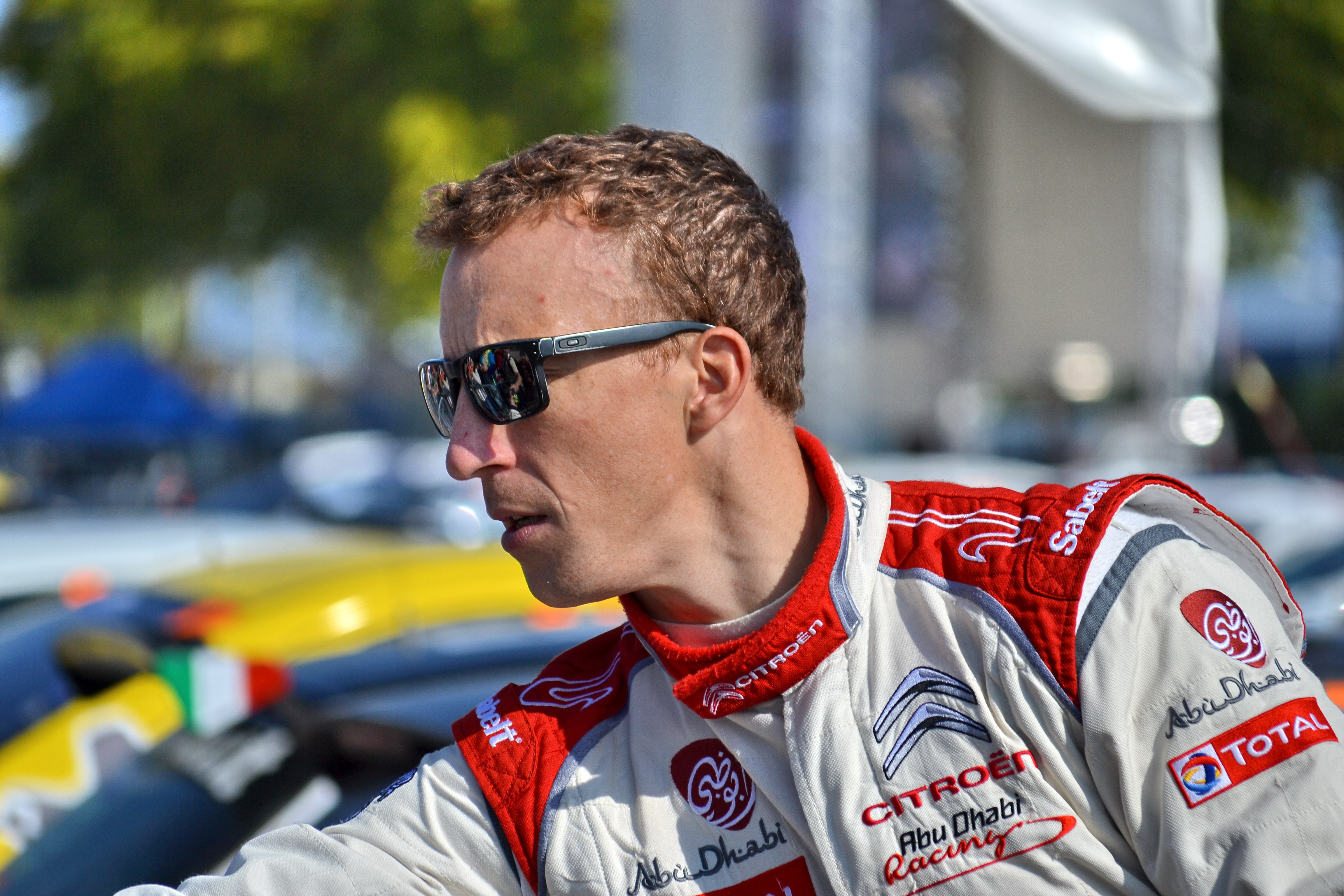 Kris Meeke au parc d'assistance de Colmar durant le Rallye de France-Alsace 2014.